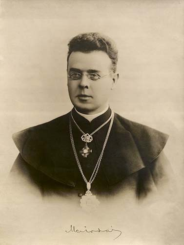 фото професора Духовної католицької академії в Петербурзі, відомого литовського письменника Майроніса (Йонаса Мачюліса)